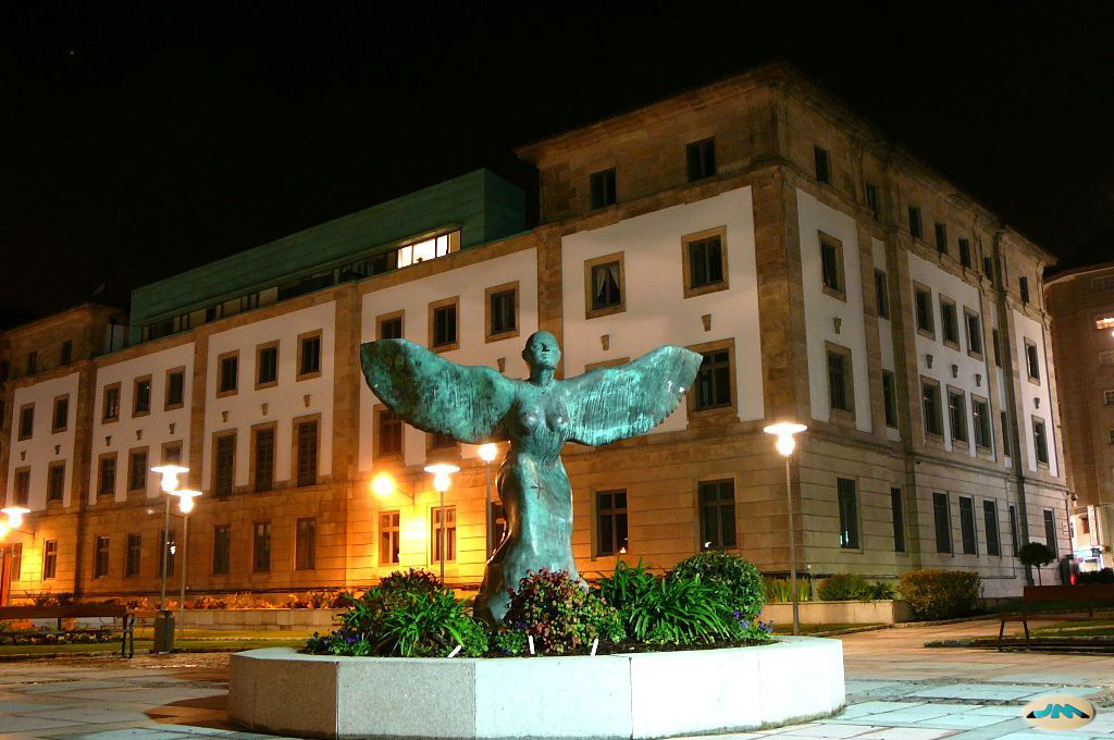 Pontevedra-Plaza de la libertad